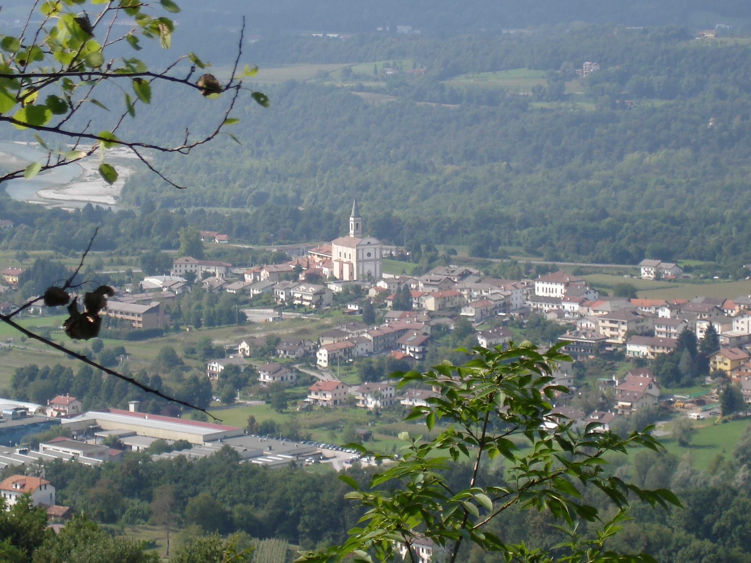 Vista del centro di Limana e della chiesa